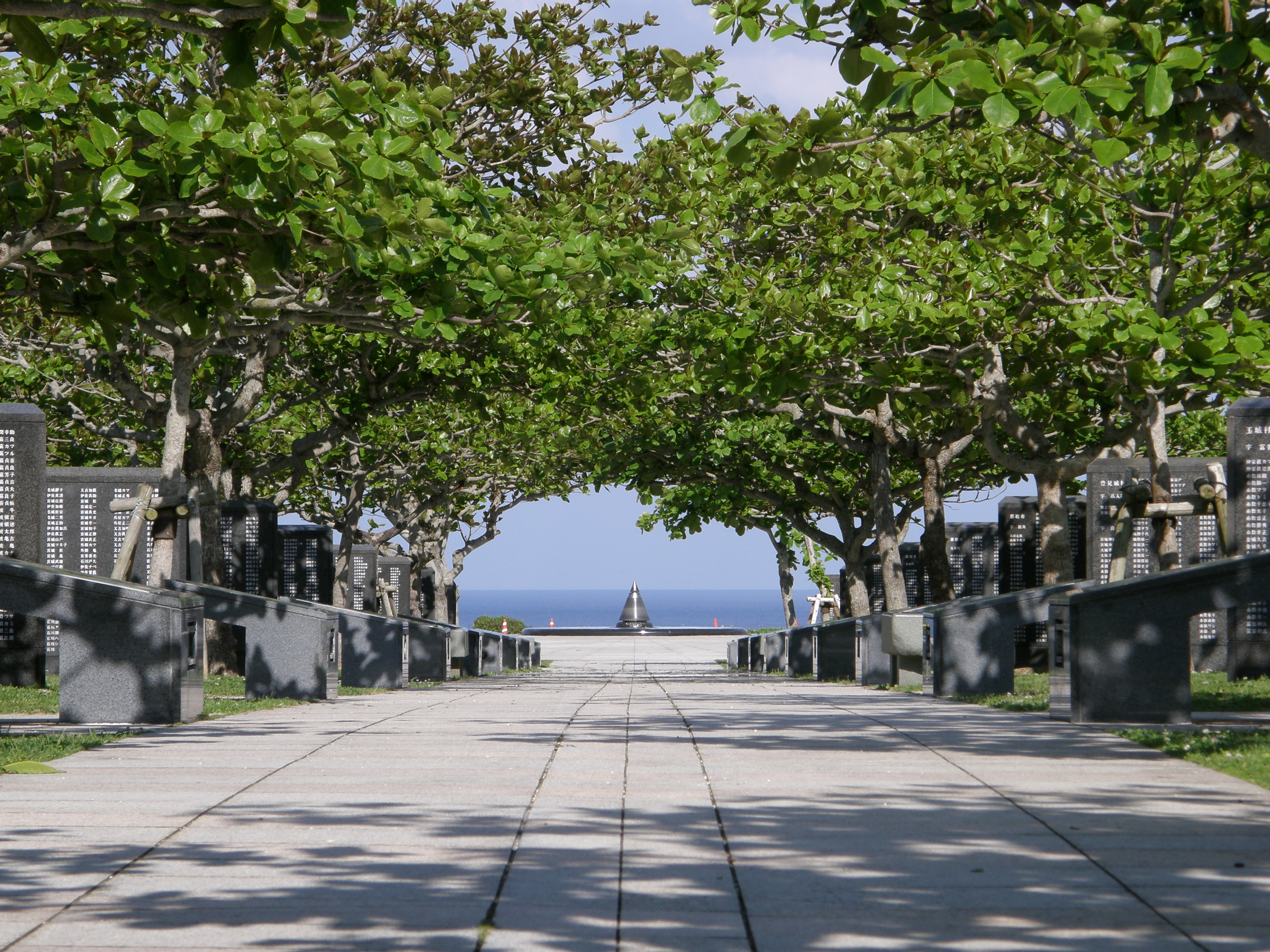 平和の礎・広場と火